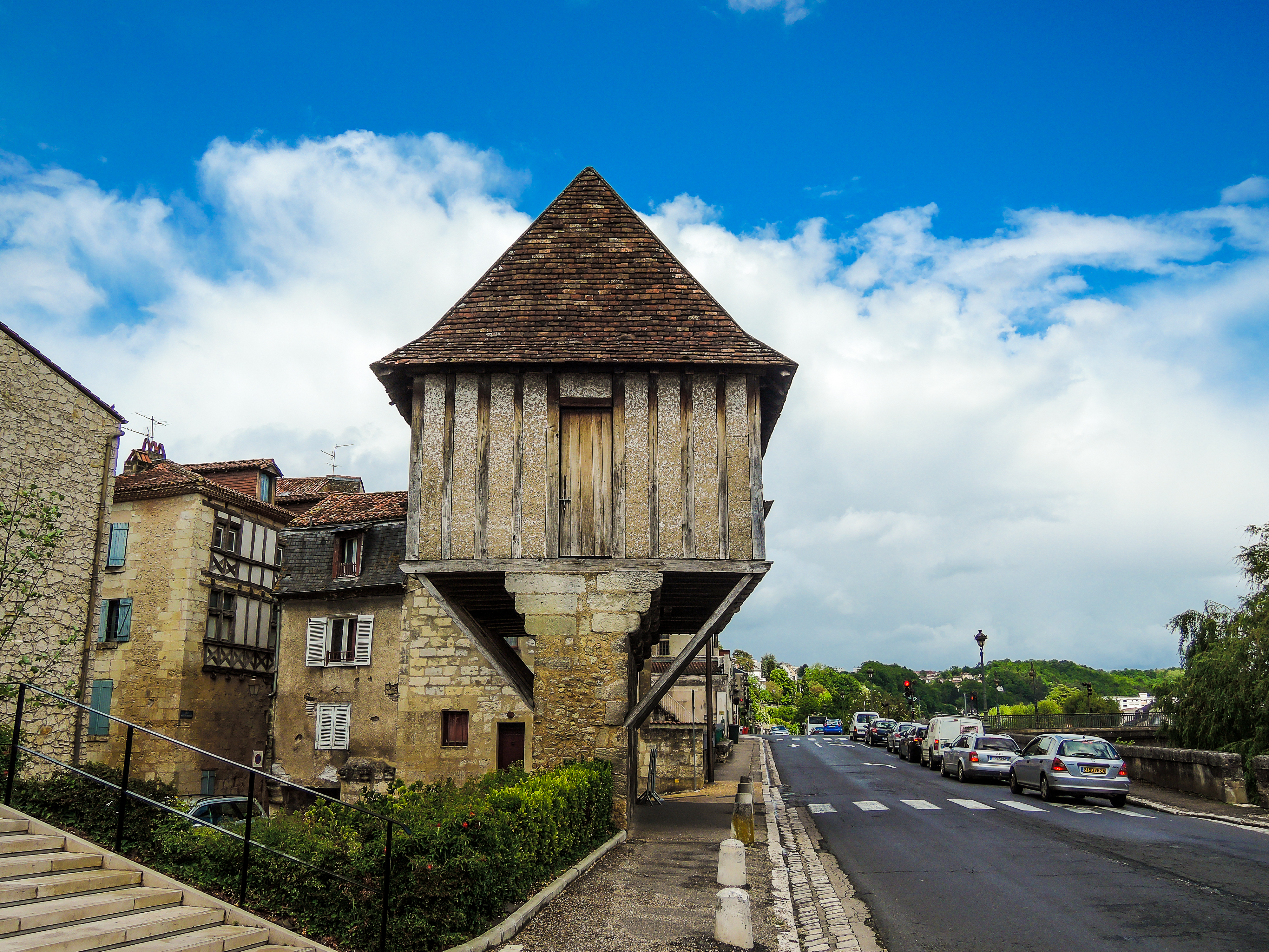 Moulin Saint-Front .